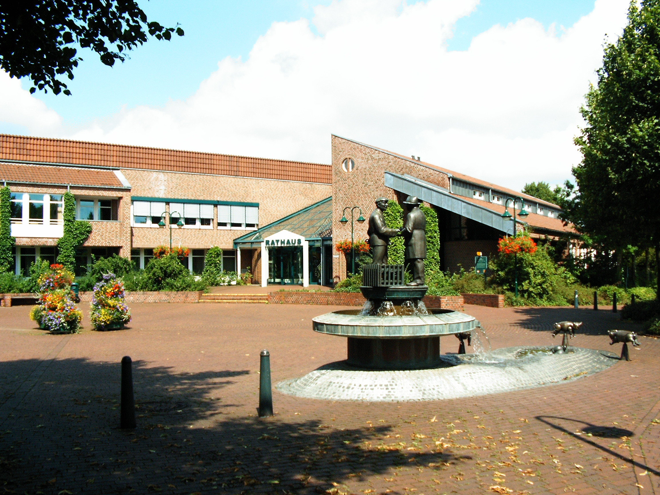 Sonsbeck: Neues Rathaus